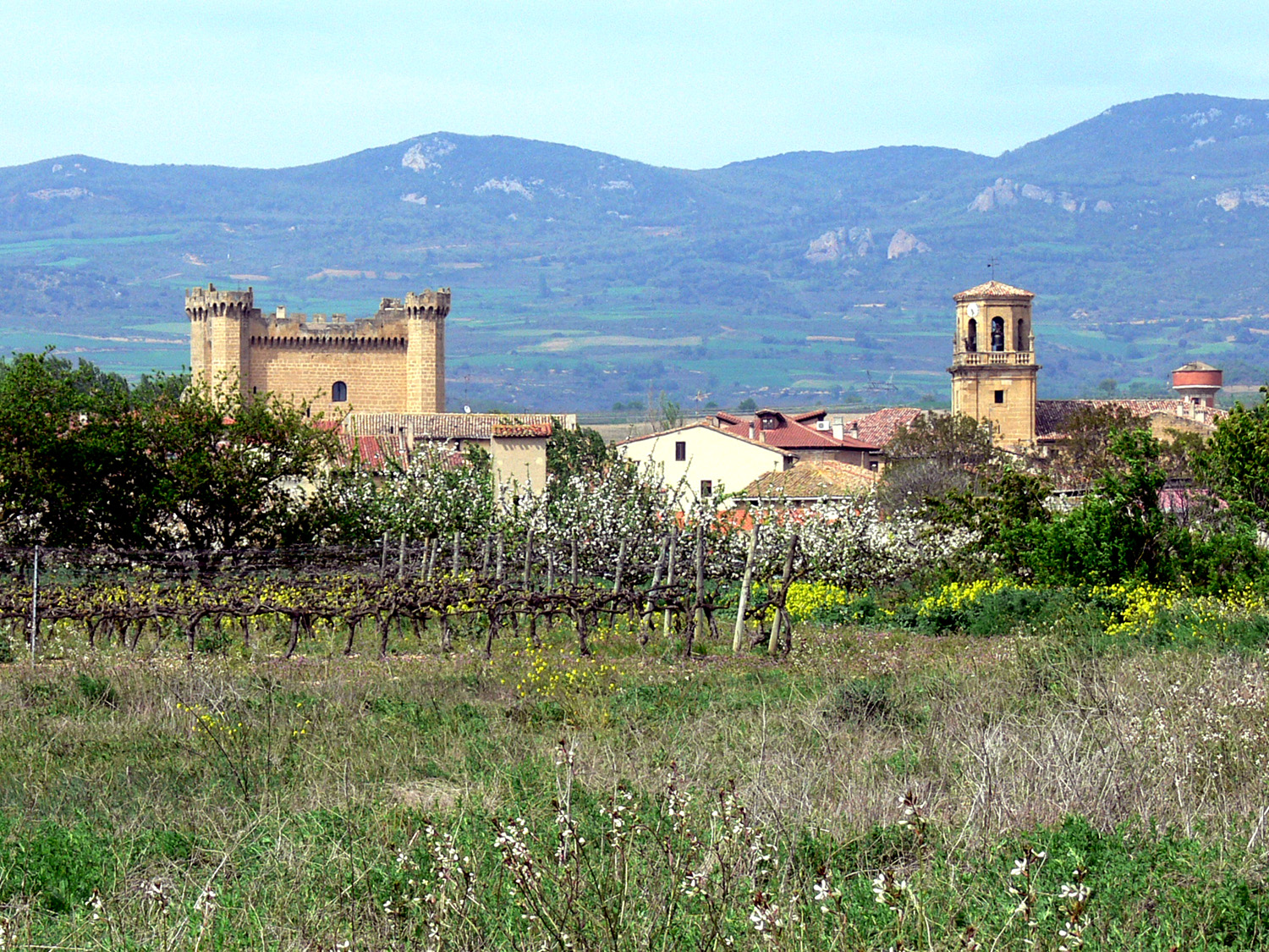 Sajazarra, La Rioja - España.